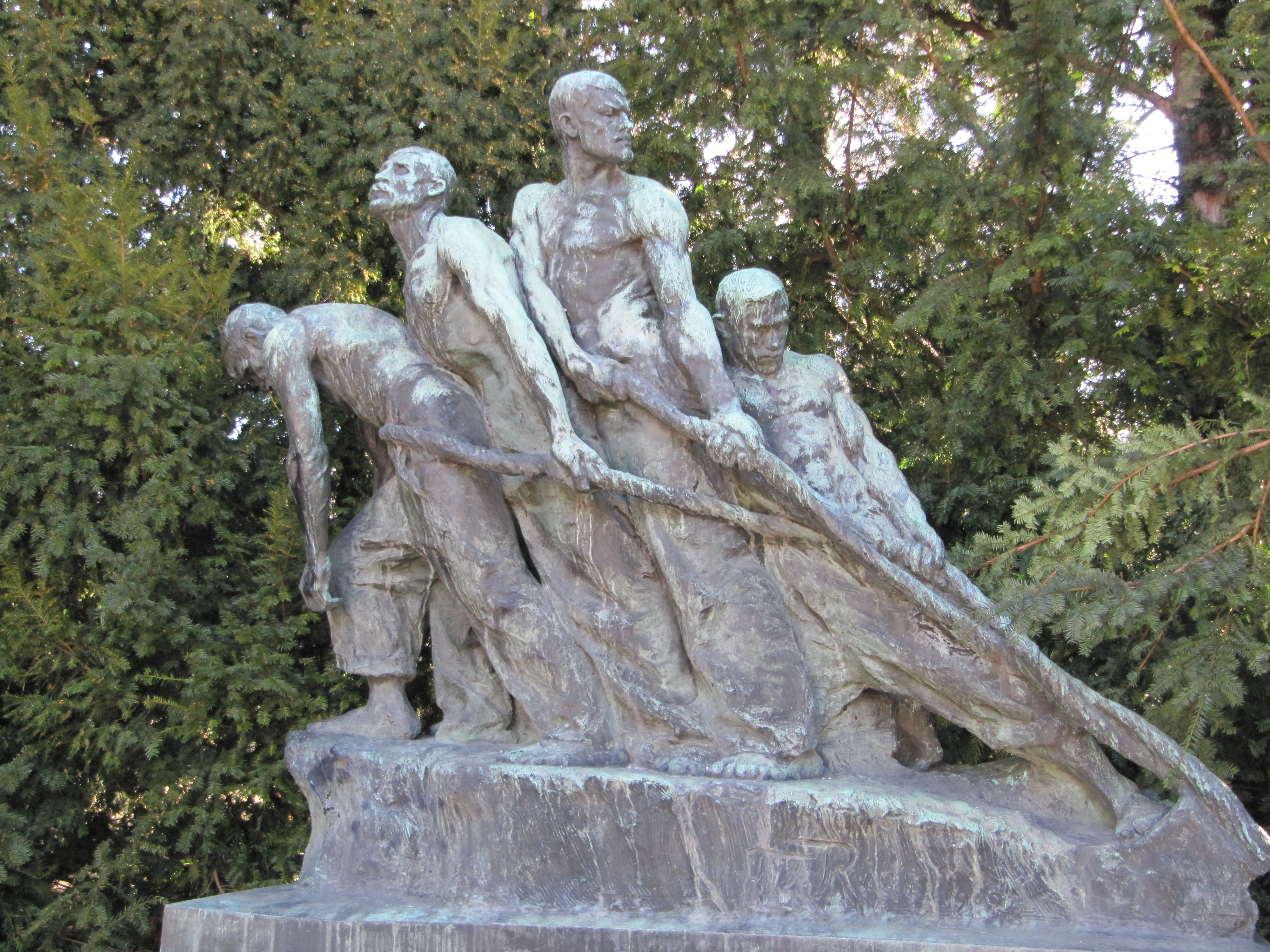 Die Unbesiegbaren